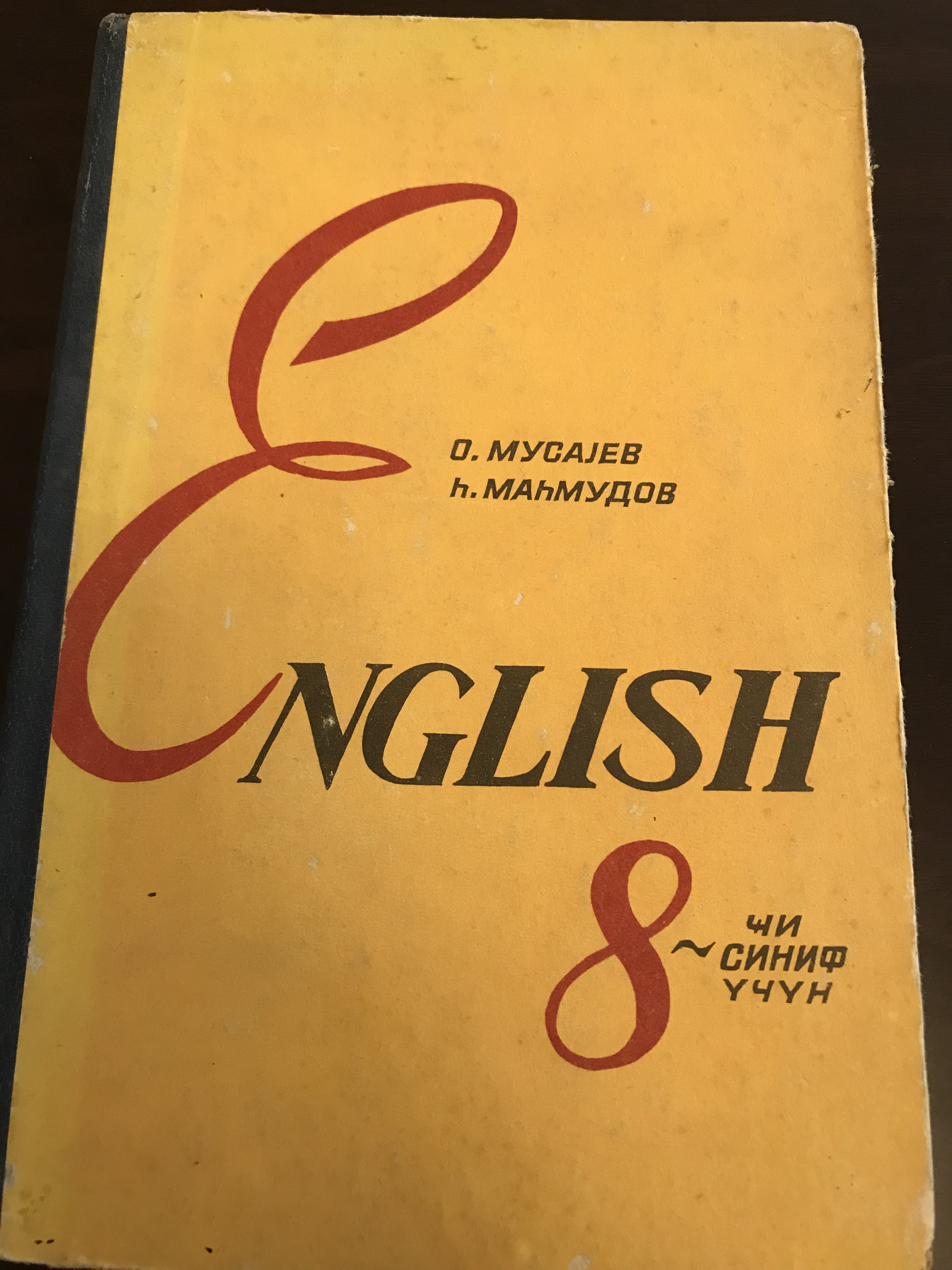 8-ci siniflər üçün İngilis dili dərsliyi. Bakı - 1972